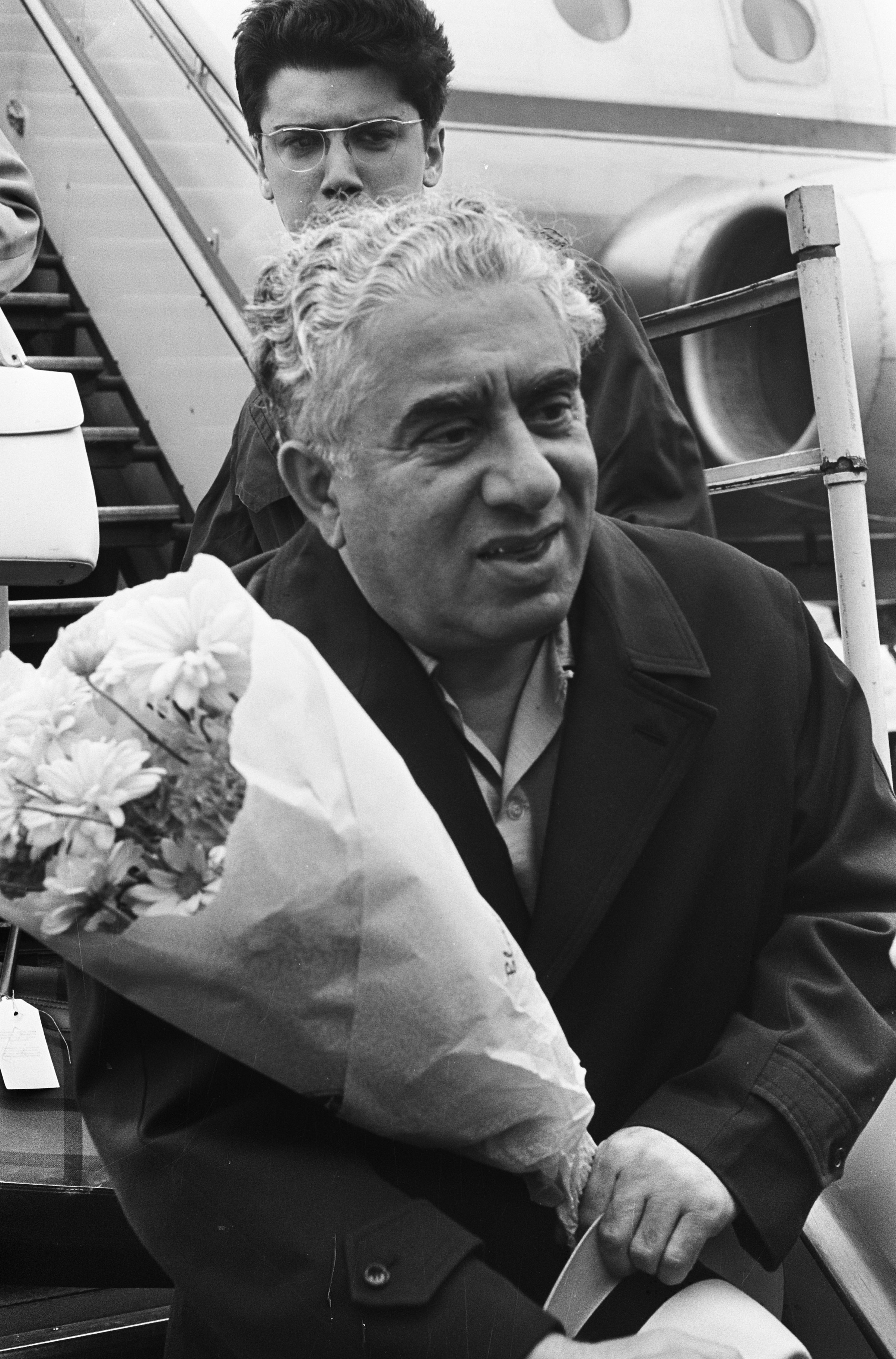 Collectie / Archief : Fotocollectie Anefo Reportage / Serie : [ onbekend ] Beschrijving : Aankomst Russische dirigent Khatsjatoerian op Schiphol, Khatsjatorian Datum : 27 juli 1964 Locatie : Noord-Holland, Schiphol Trefwoorden : aankomsten, dirigenten Fotograaf : Pot, Harry / Anefo Auteursrechthebbende : Nationaal Archief Materiaalsoort : Negatief (zwart/wit) Nummer archiefinventaris : bekijk toegang 2.24.01.05 Bestanddeelnummer : 916-6862